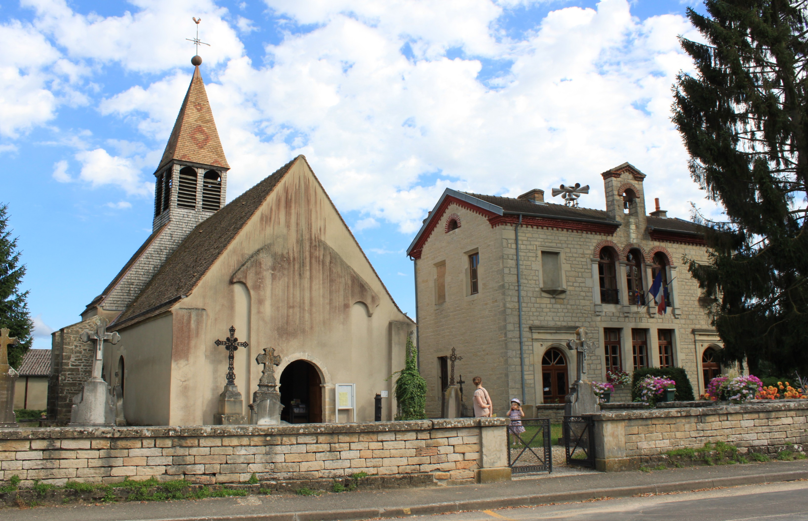 Mairie et Eglise Saint-Maurice, Sennecey-lès-Dijon, Côte-d'Or, Bourgogne, France